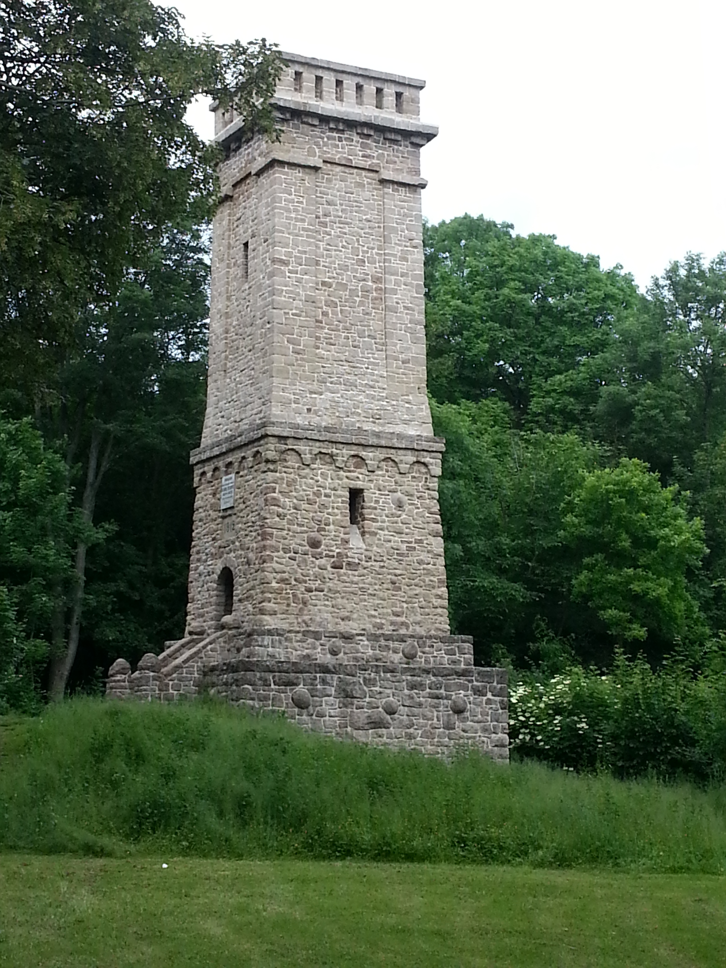 Aussichtsturm auf dem Heeseberg in Jerxheim von Osten, LSG „Heeseberg“